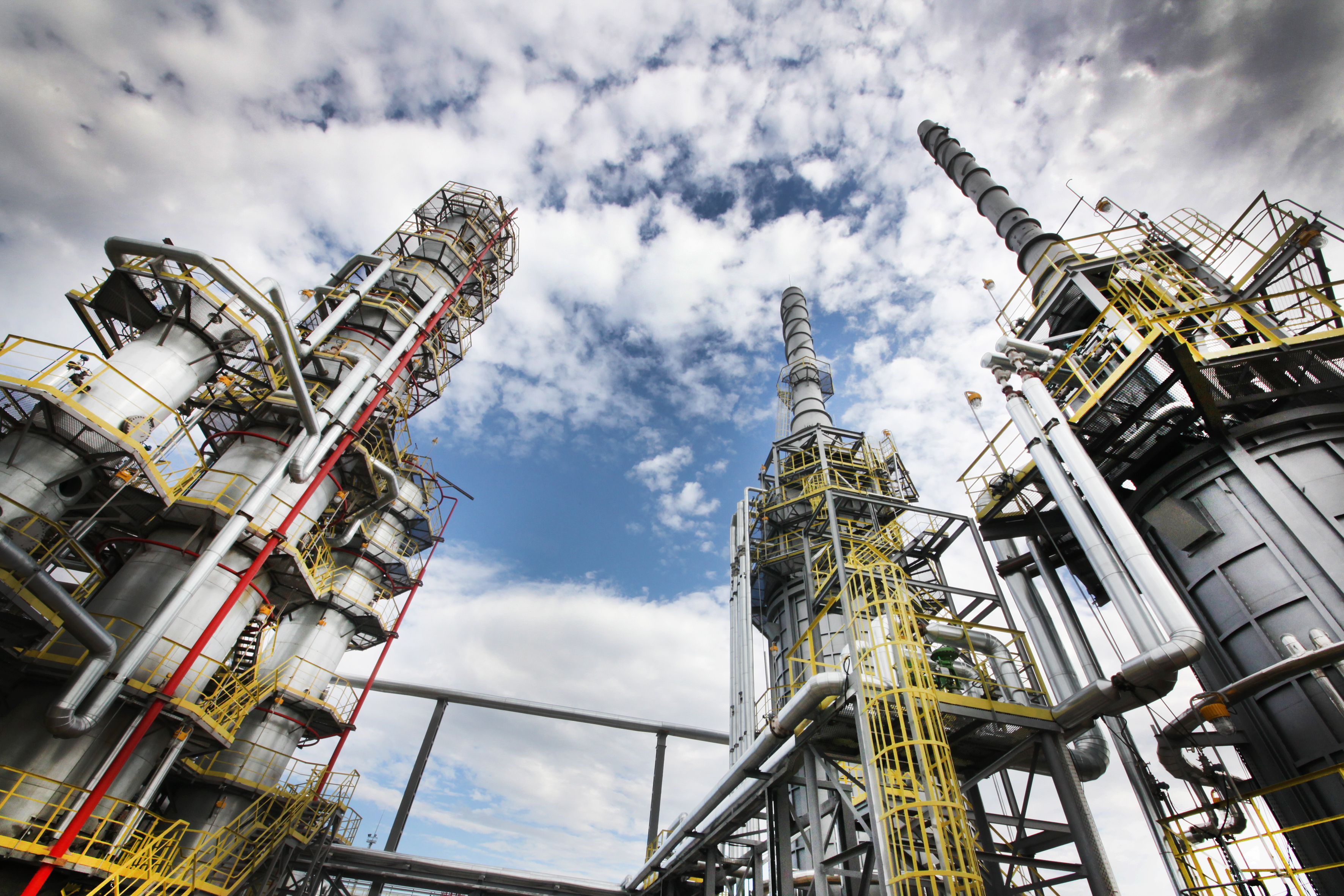 Установка первичной переработки нефти АТ-5 на Ильском НПЗ